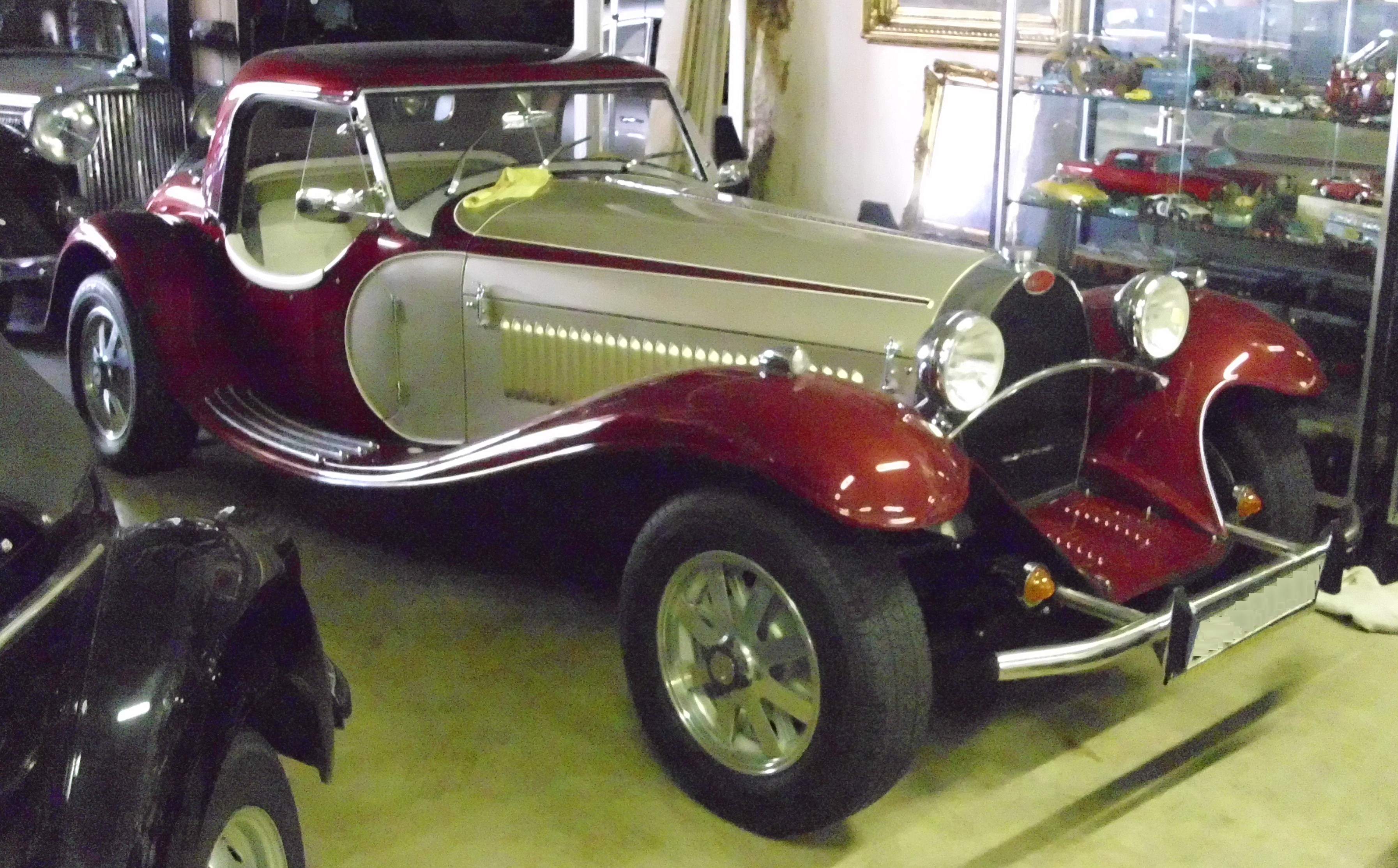 De La Chapelle 55 1989 im Automobilmuseum Stainz